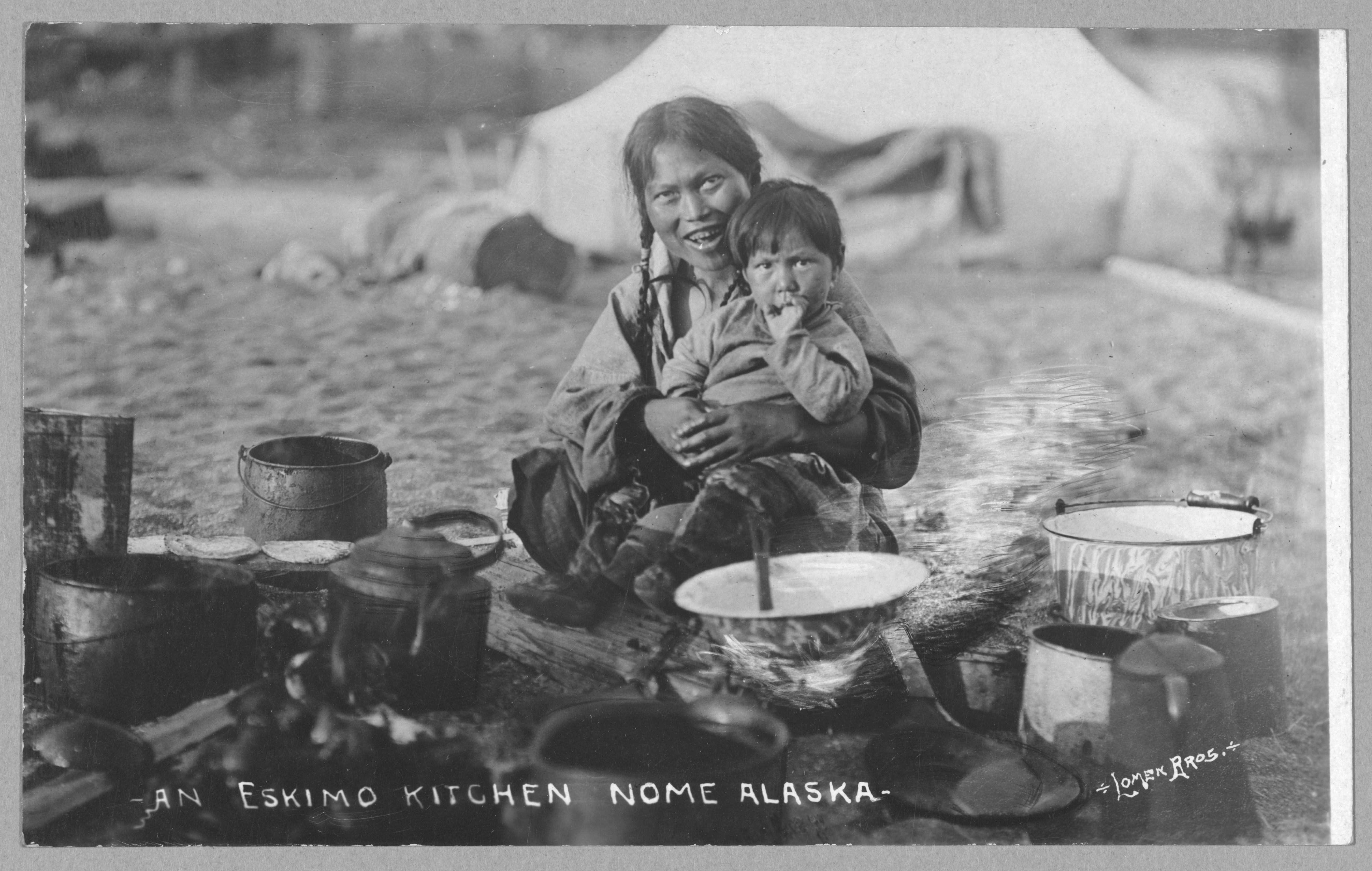 TITLE: An Eskimo kitchen outdoors